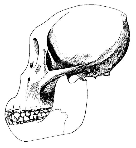 Cráneo de dryopithecus brancoi.